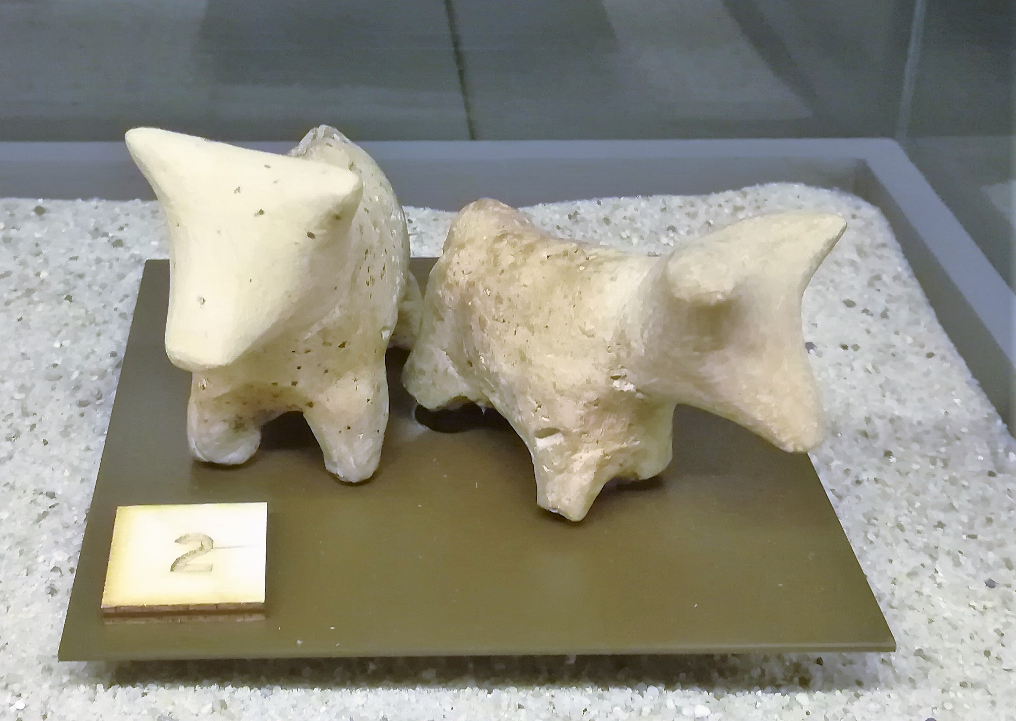 Dwa wołki z gliny z Bilczy Złotych. Muzeum Nar. w Krakowie. Wystawa w Muzeum Śląskim - Katowice.